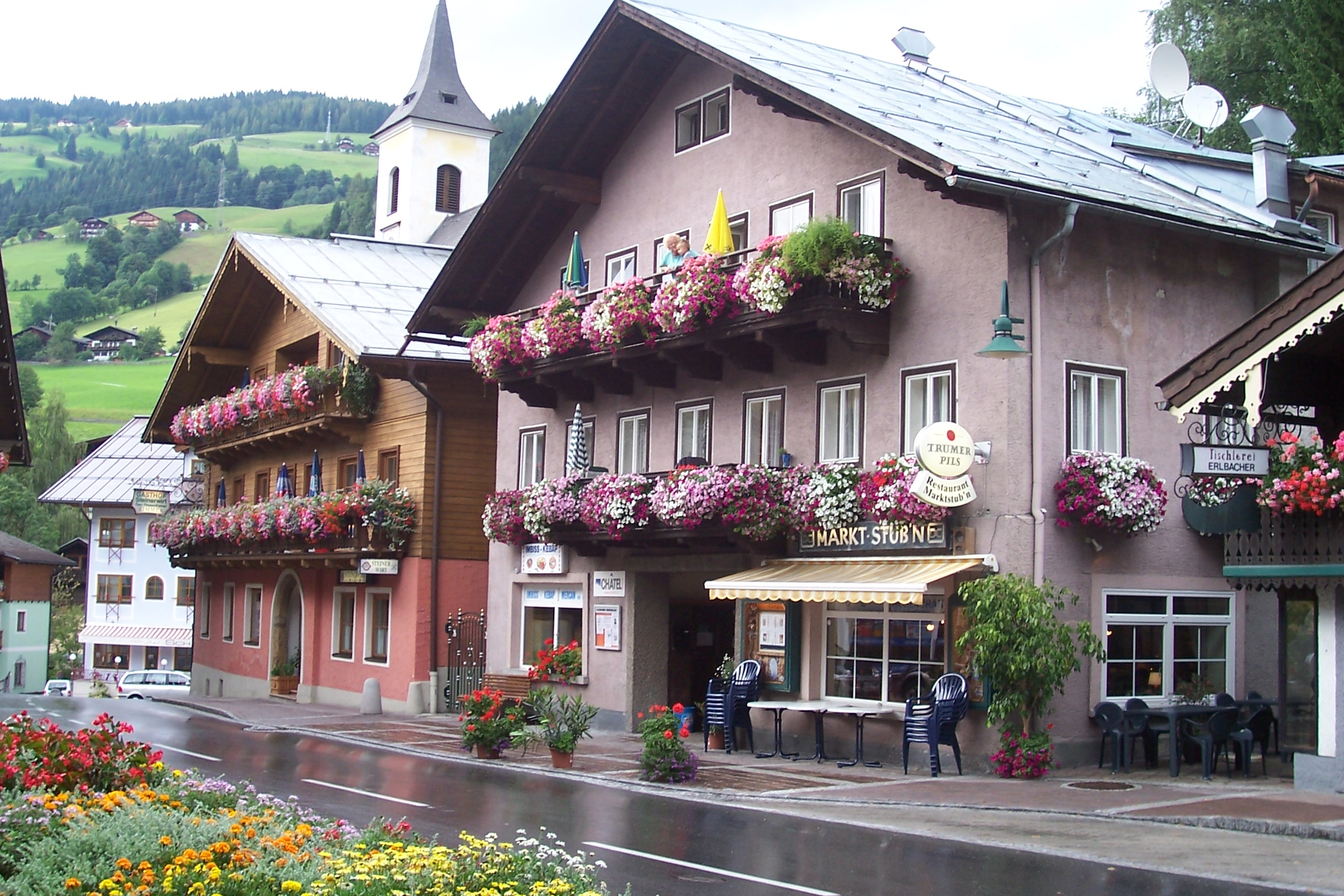 Wagrain, Salzbursko, Rakousko.